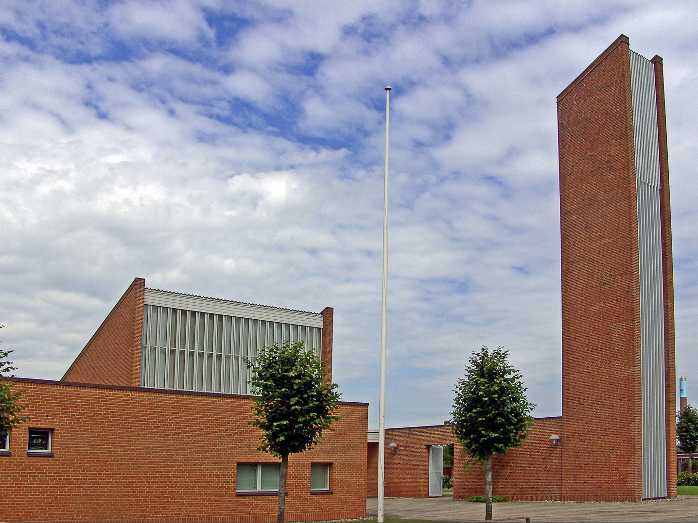 fra syd